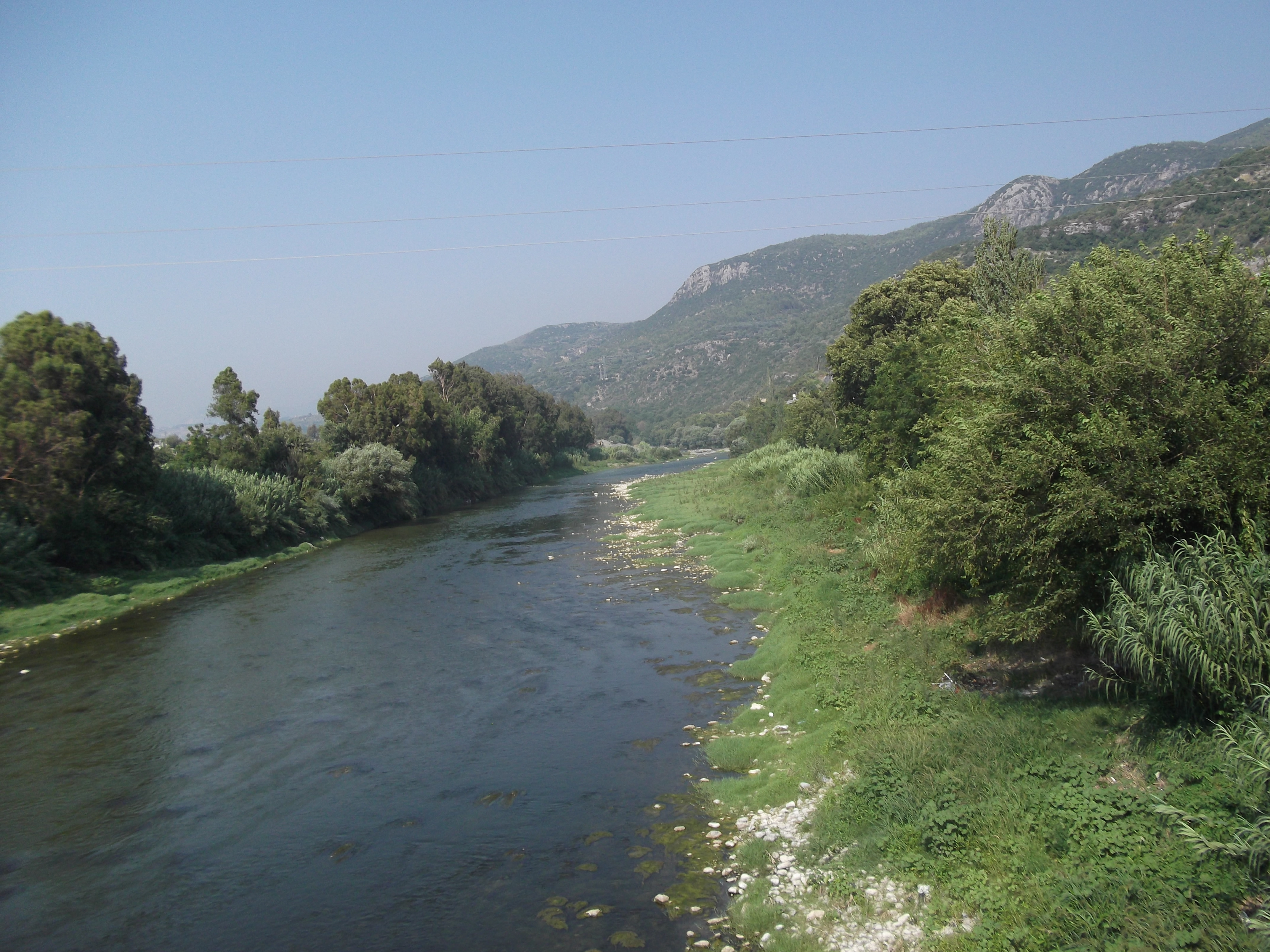 Aknehir'den Asi Nehri